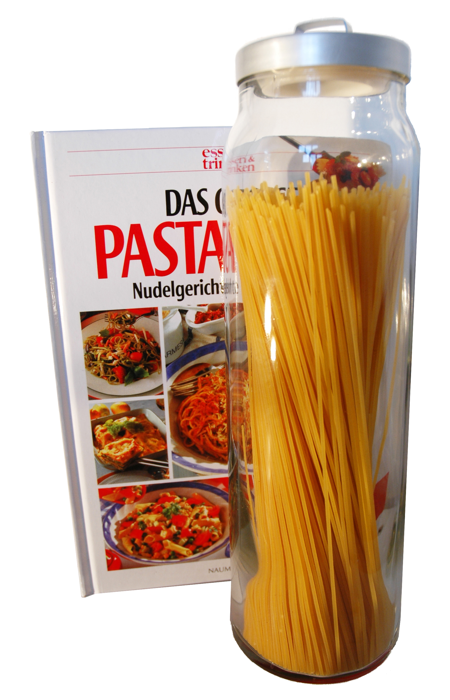 Spaghetti